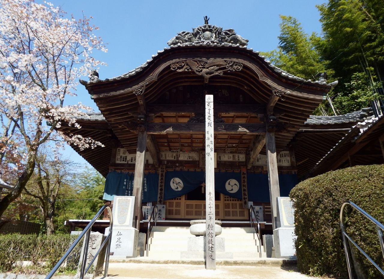 栄福寺の本堂